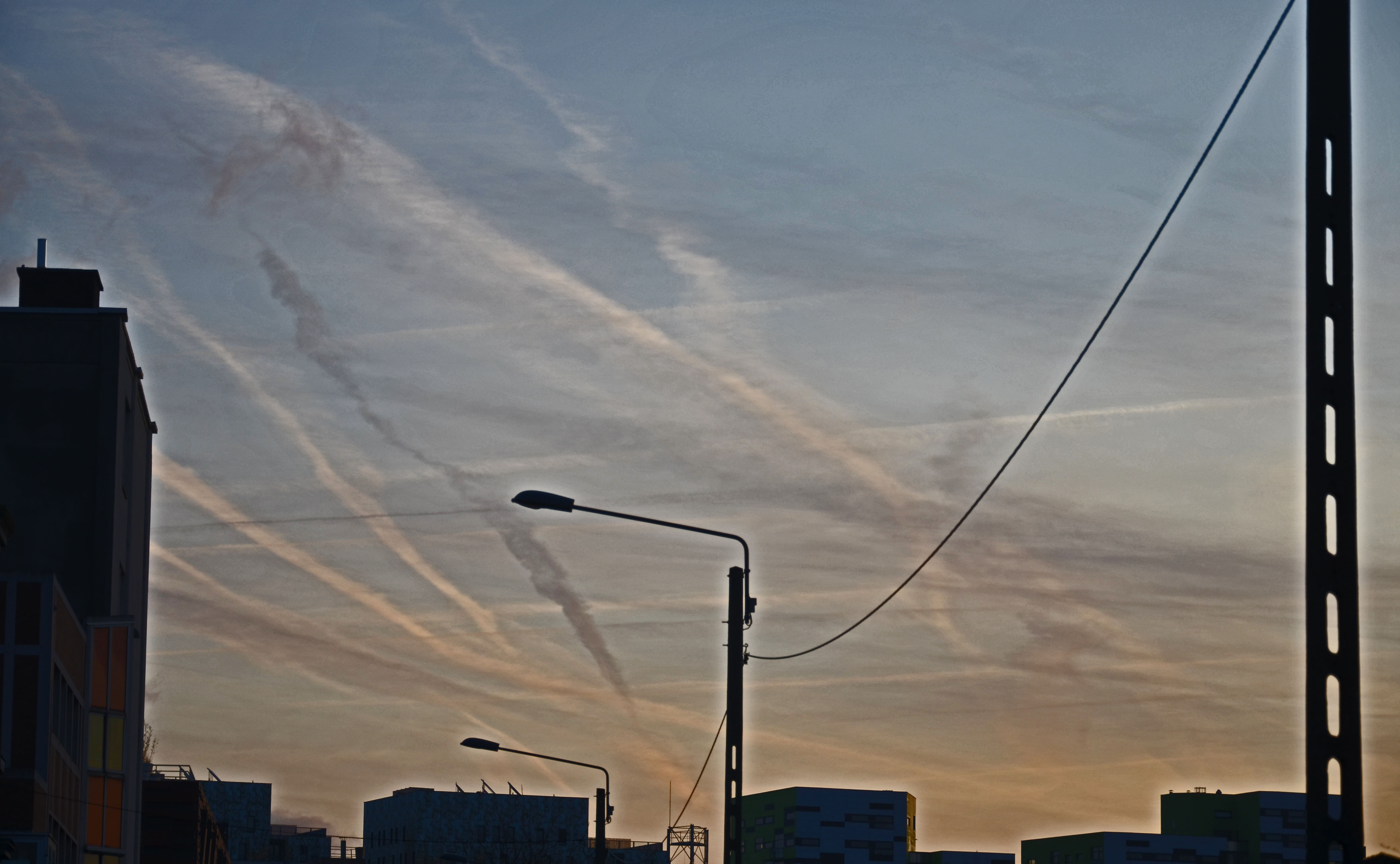 Trainées de condensation d'avion et probables réactions fr: Photochimie-photochimiques , photographiées à Lille (Nord de la France)